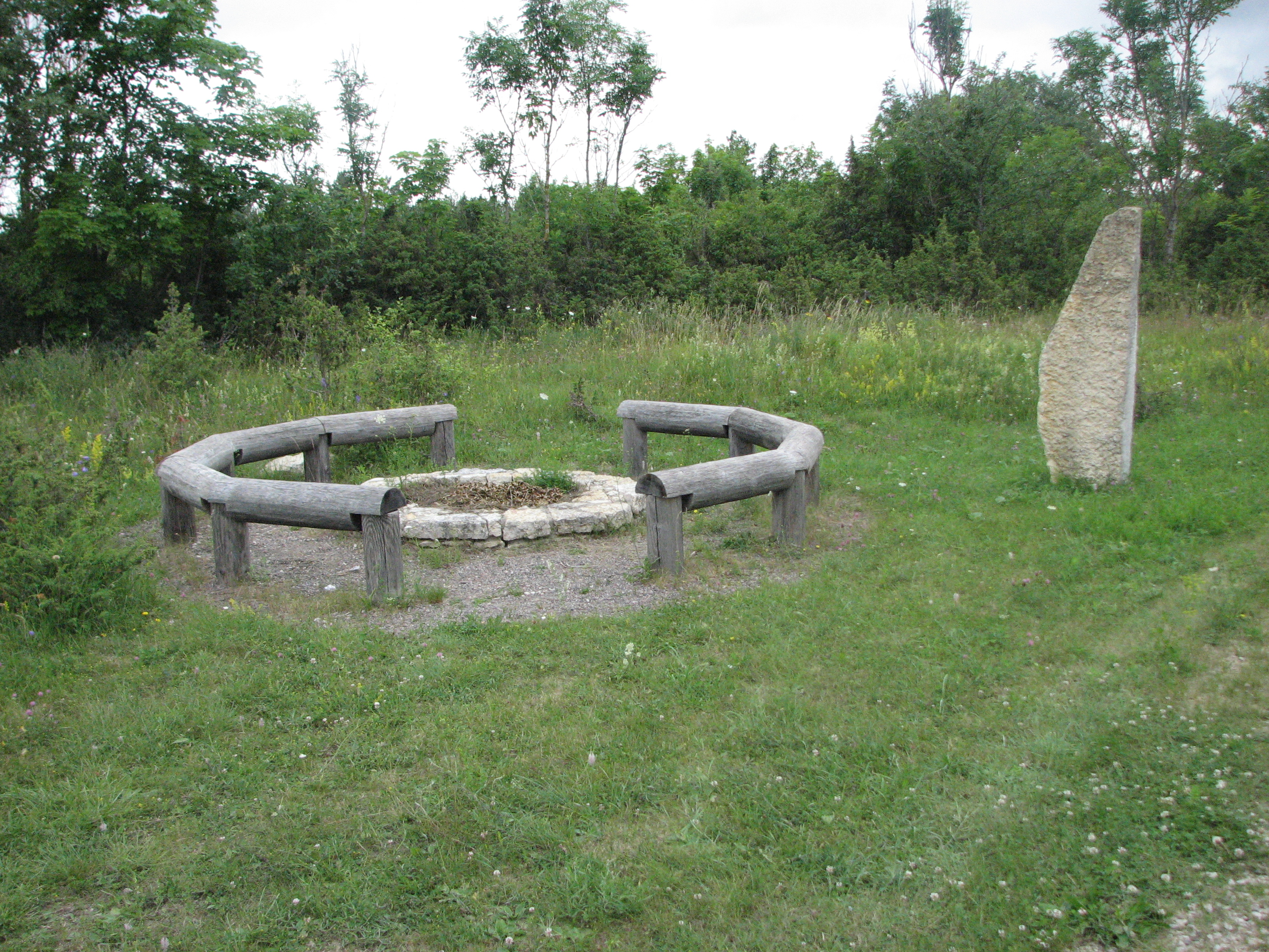 Kividest ring Laheküla servas Laimjala vallas